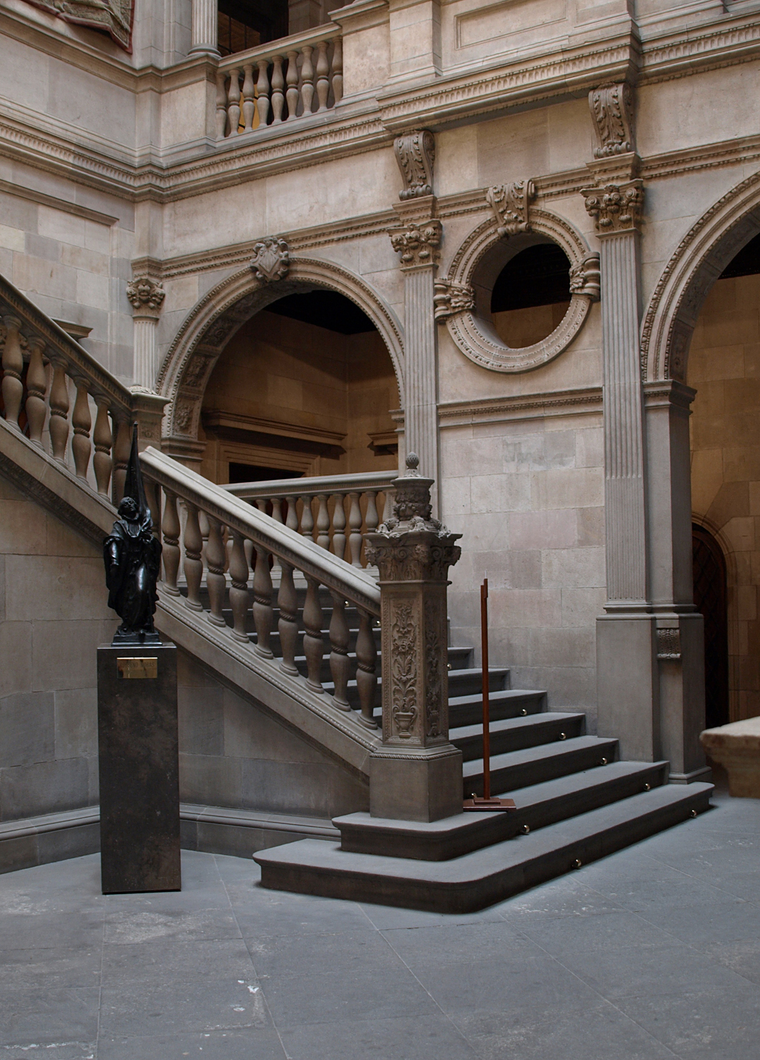 Escala d'honor (Ajuntament de Barcelona)